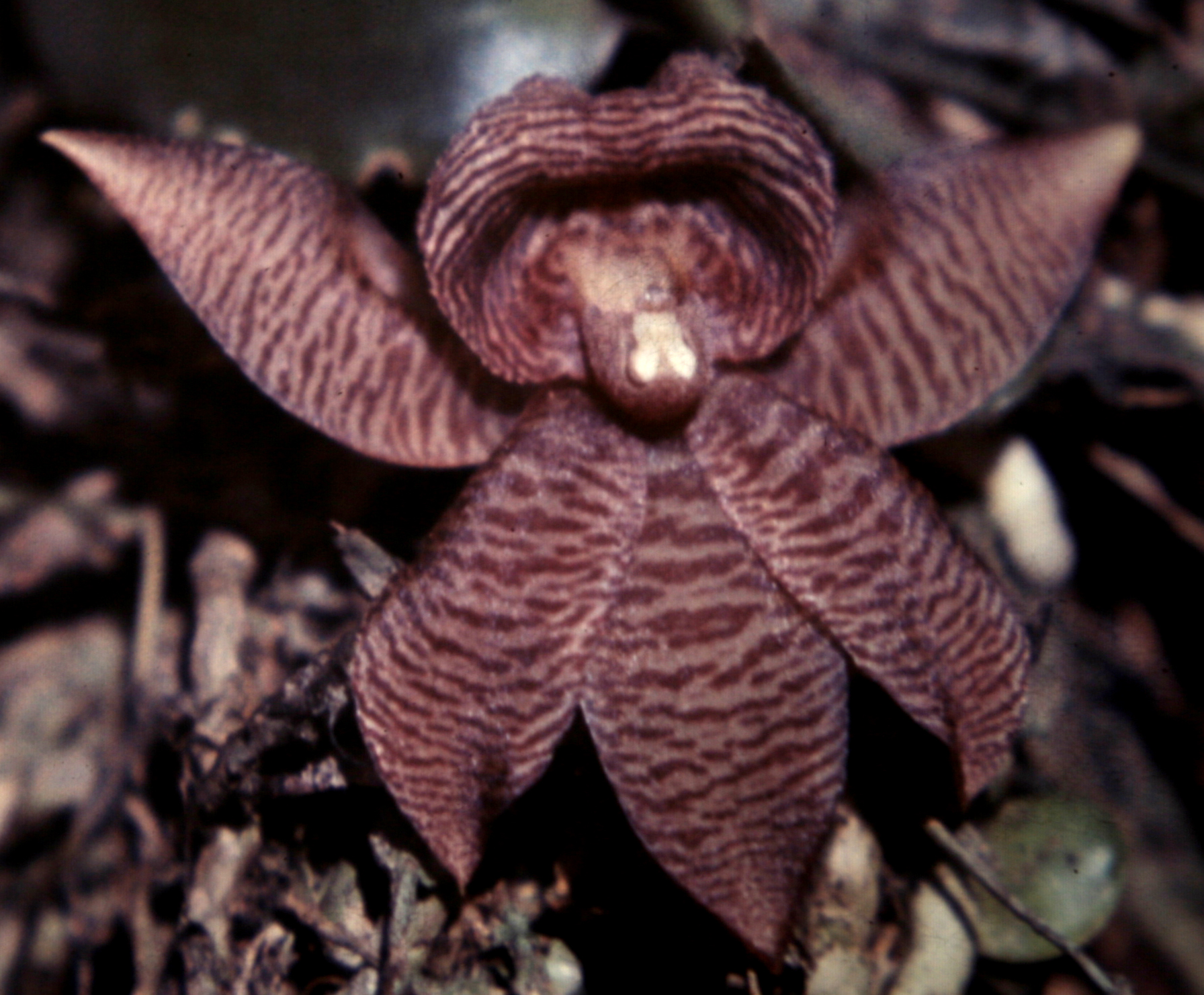 Chaubardiella tigrina. Found in Suriname, 1972-1982.